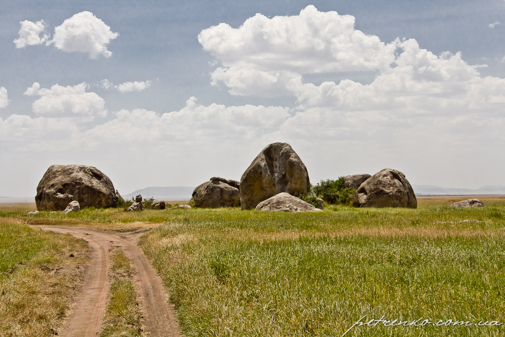 Bariadi, Tanzania